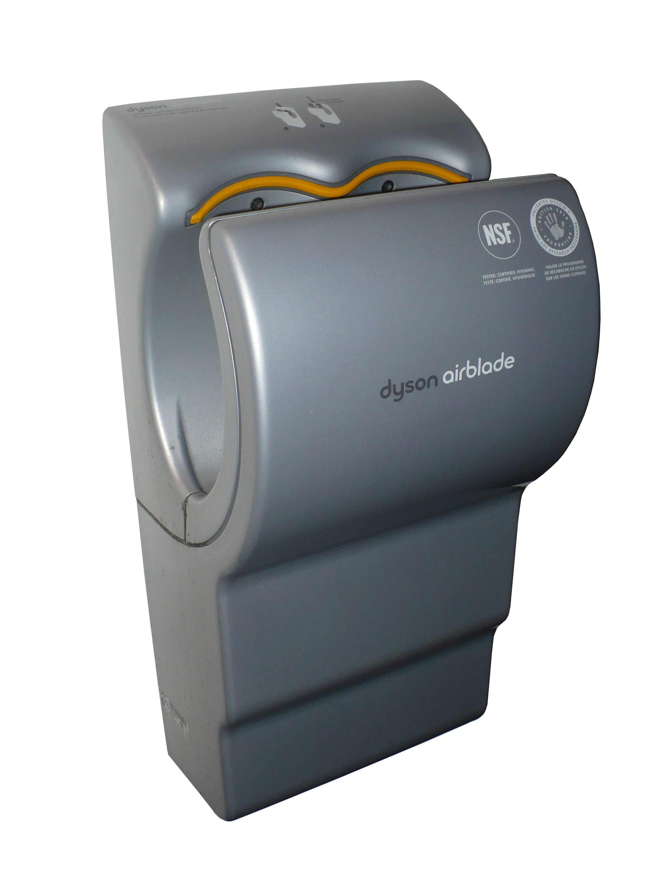 Dyson Airblade hand drier - transparent background